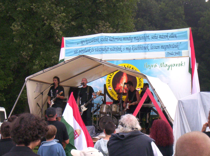 Kárpátia koncert 2005-ben Váralján